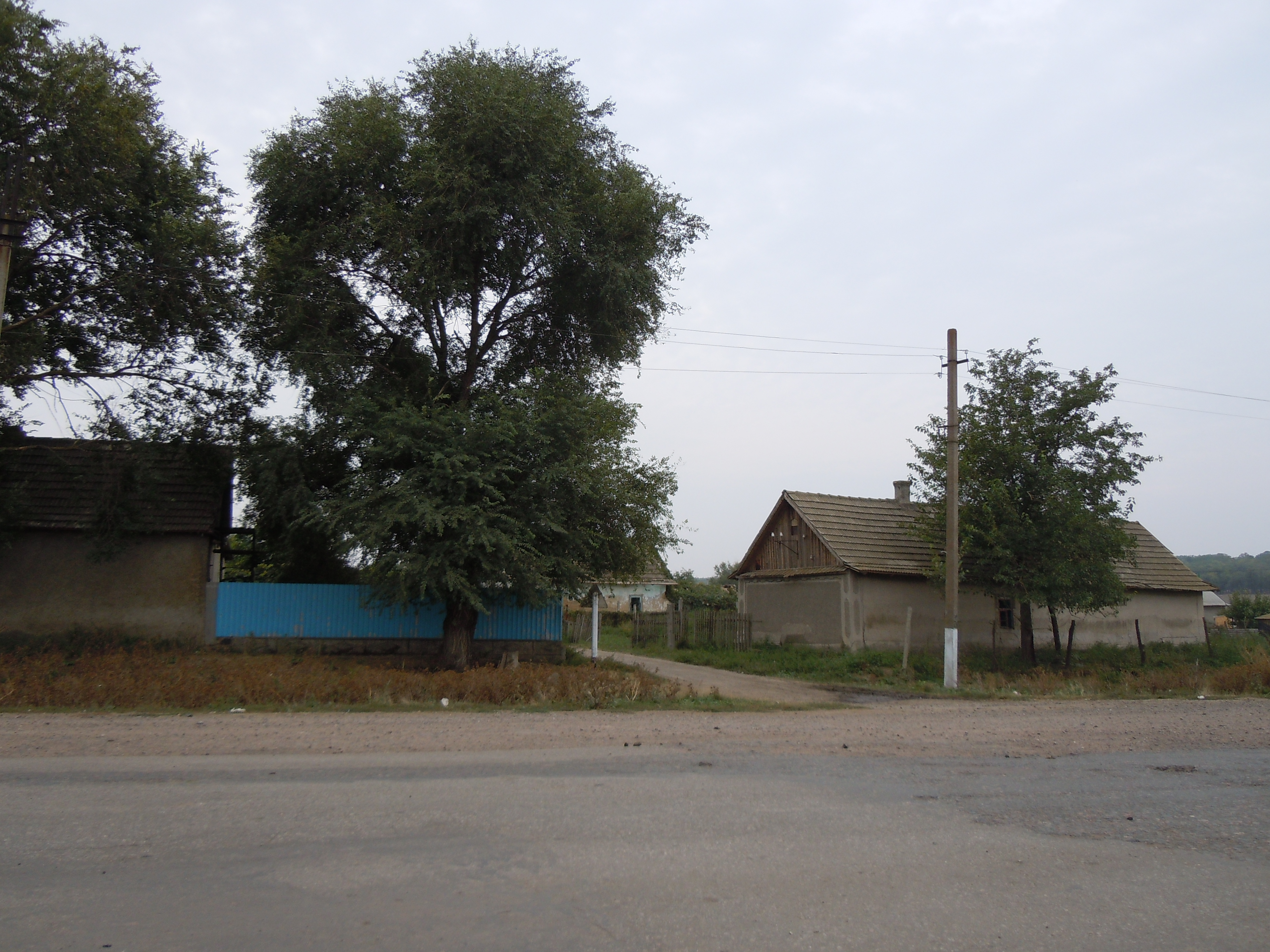 Село Монаші, Білгород-Дністровський район, Одеська область